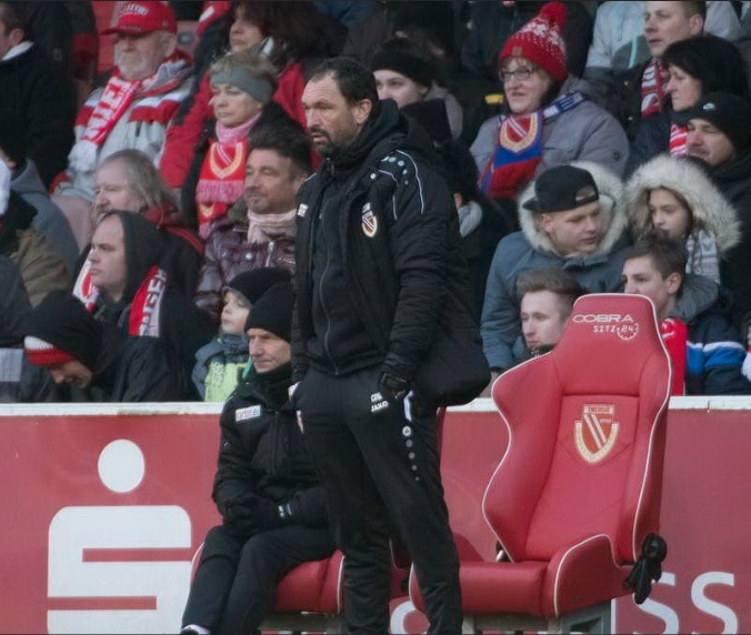 Claus-Dieter Wollitz als Trainer des FC Energie Cottbus